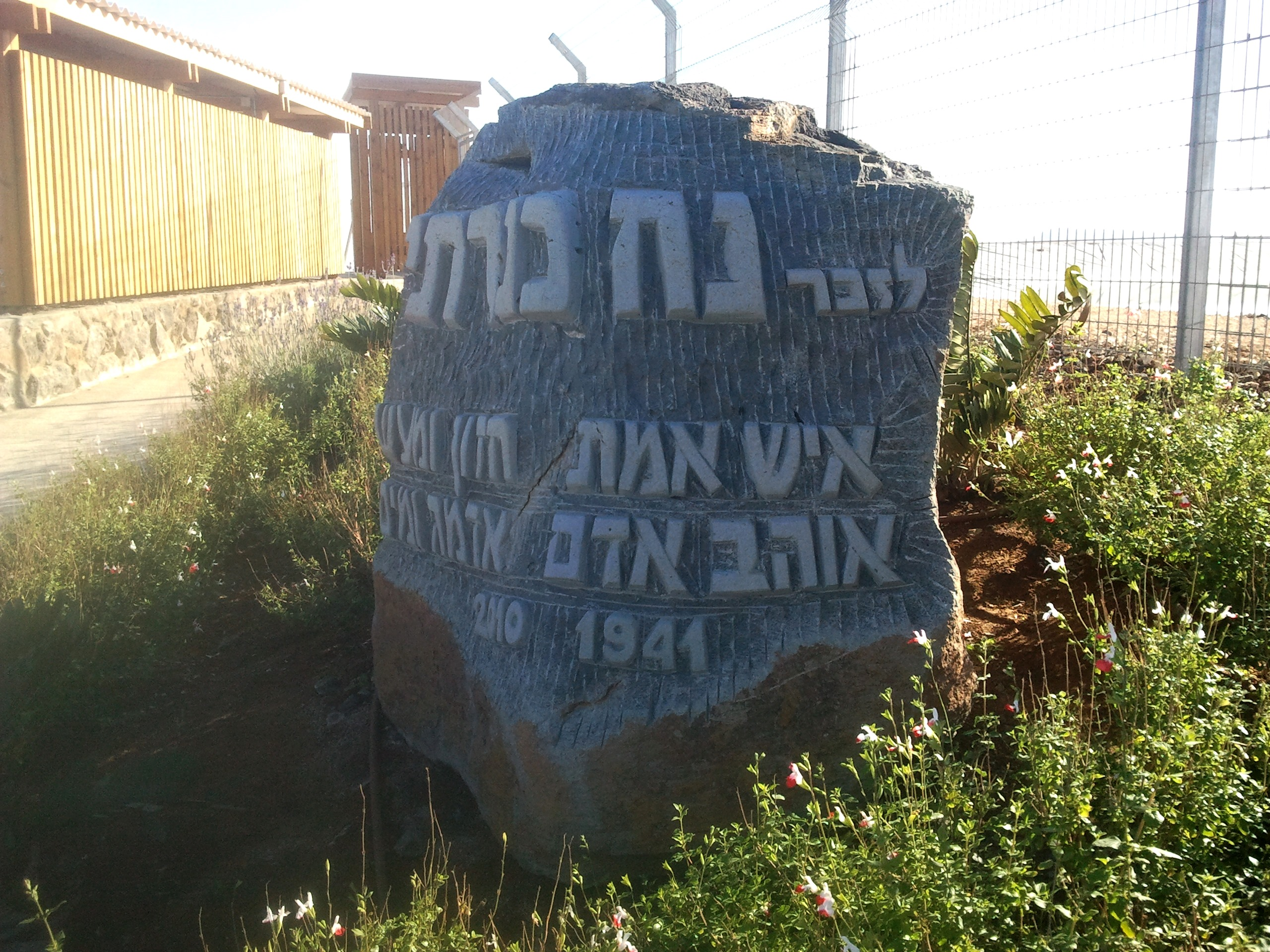 מצפה נח הוא נקודת תצפית הקרויה על שמו של "נח כנרתי" ונמצאת על רמת סירין. ליד נקודת התצפית מאגר מים הקרוי גם הוא על שמו של נח כנרתי